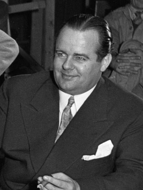 Filmregisseur Gerard Rutten in de filmstudio. Gerard Rutten (met alpino) op de set met filmproducent Joop Geesink 10 december 1953